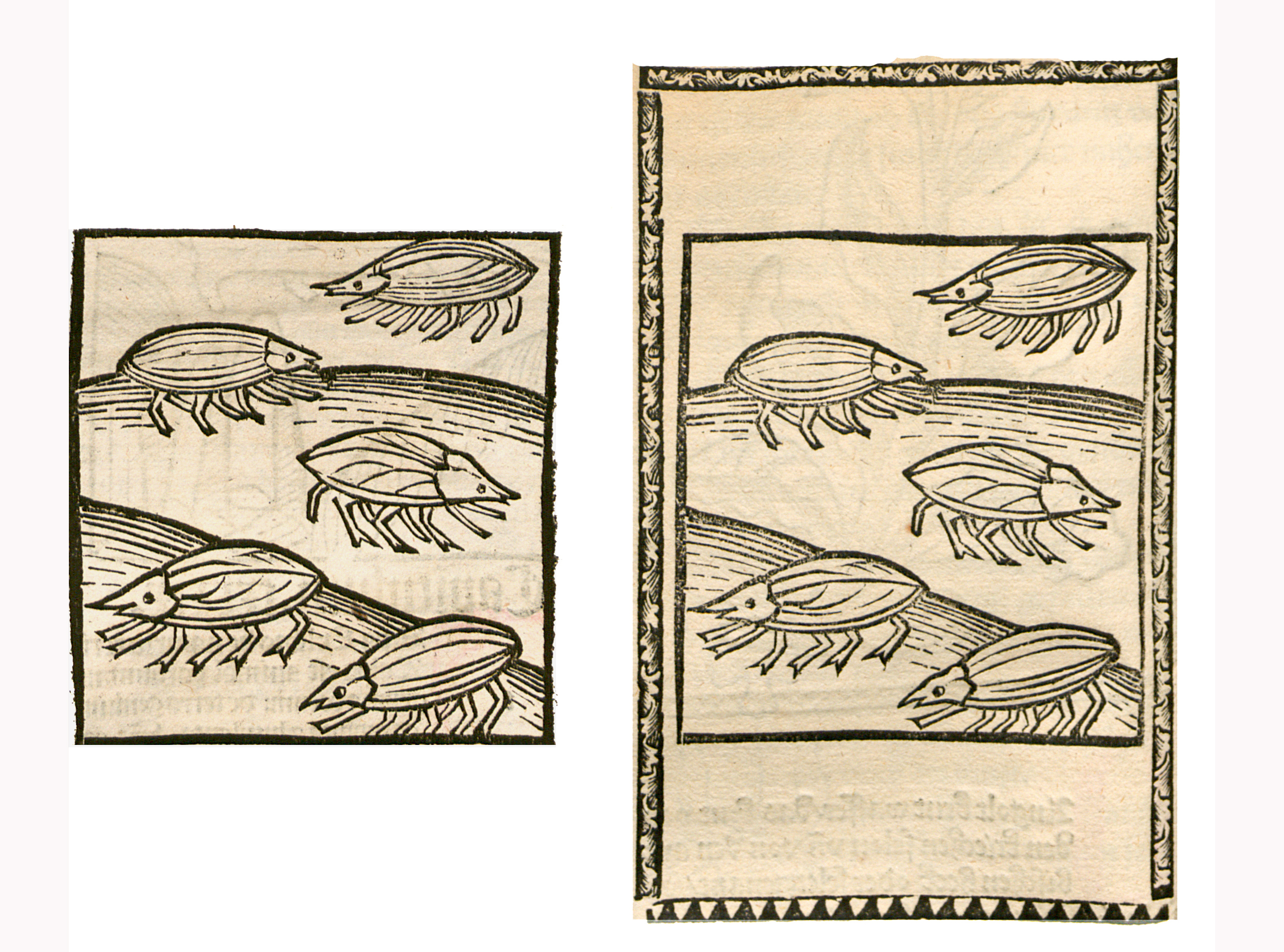 Abbildung von: Meilander Wurm (Meloe proscarabeus)